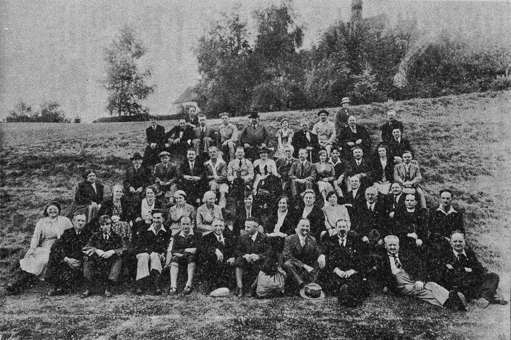 12-a internacia Ido-Kongreso en Fredericia (Danio). Ekskursantaj kongresmembroj apud ponto.